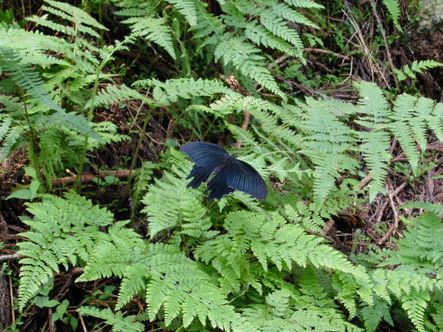 芹生谷で見かけたカラスアゲハ